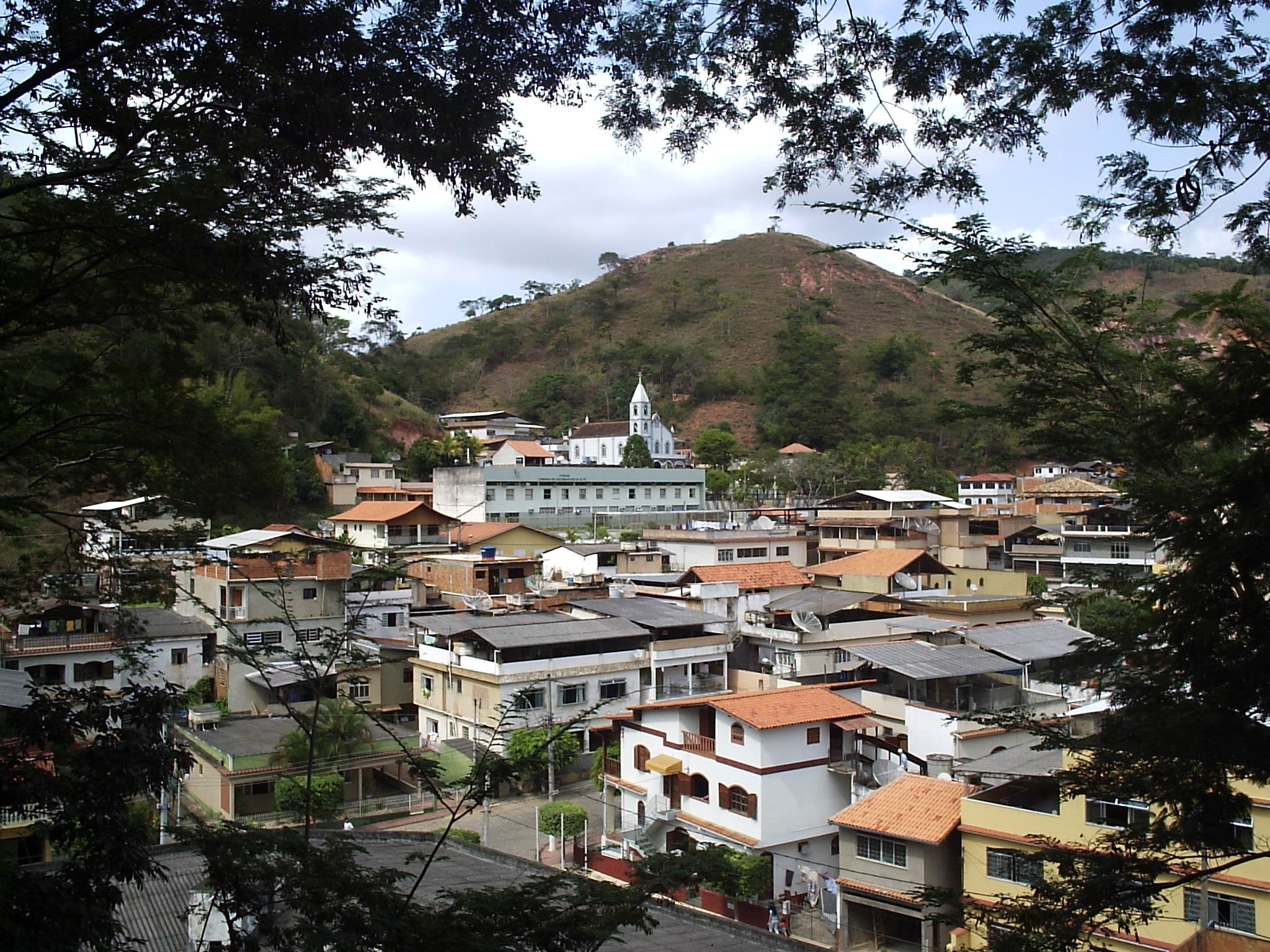 Vista parcial de São Sebastião do Alto-RJ. A fotografia foi registrada em 27 de agosto de 2005, da quadra de tênis municipal.